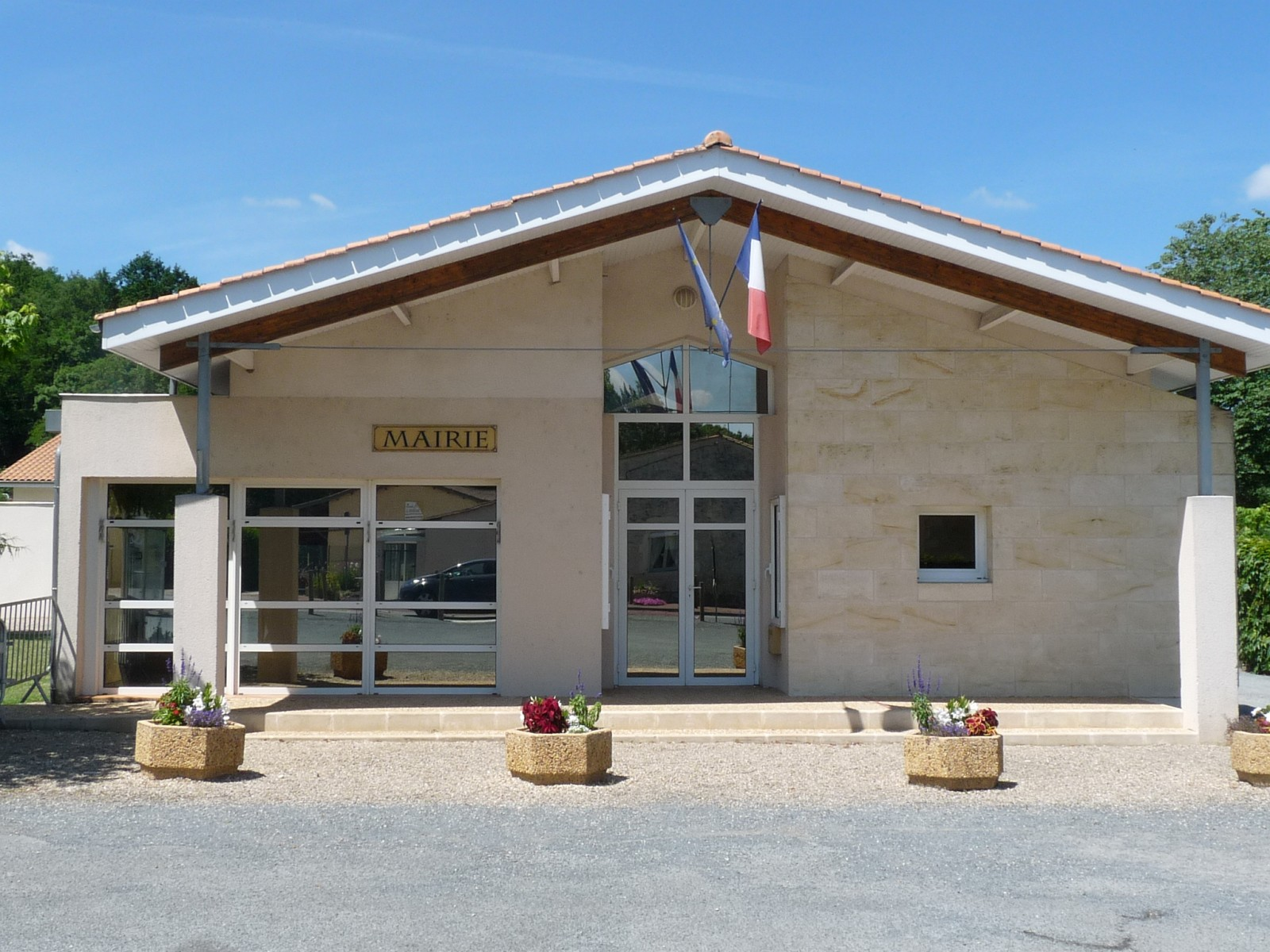 Mairie de St-André-et-Appelles, Gironde, France